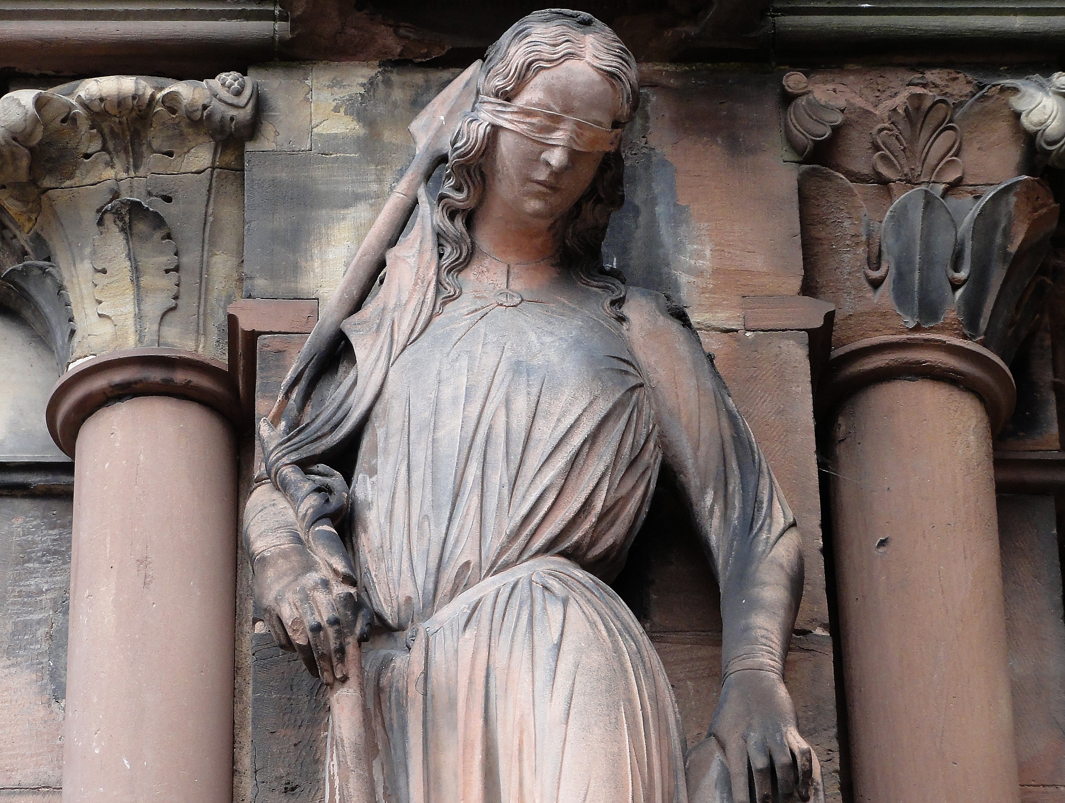 Alsace, Bas-Rhin, Cathédrale Notre-Dame de Strasbourg (PA00085015). Portail du transept sud (XIIe): "La Synagogue"